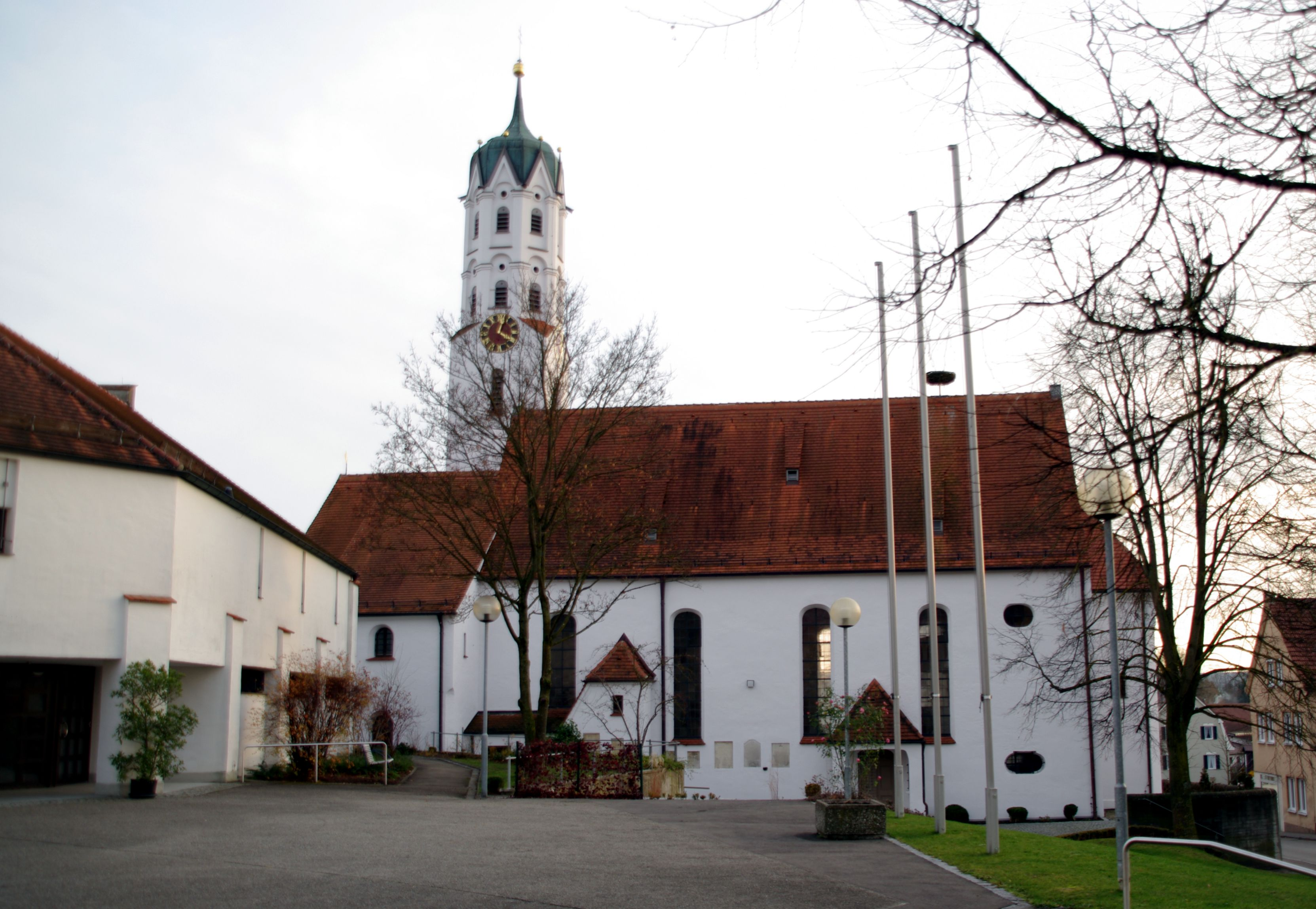 St. Anna-Kirche in Dinkelscherben